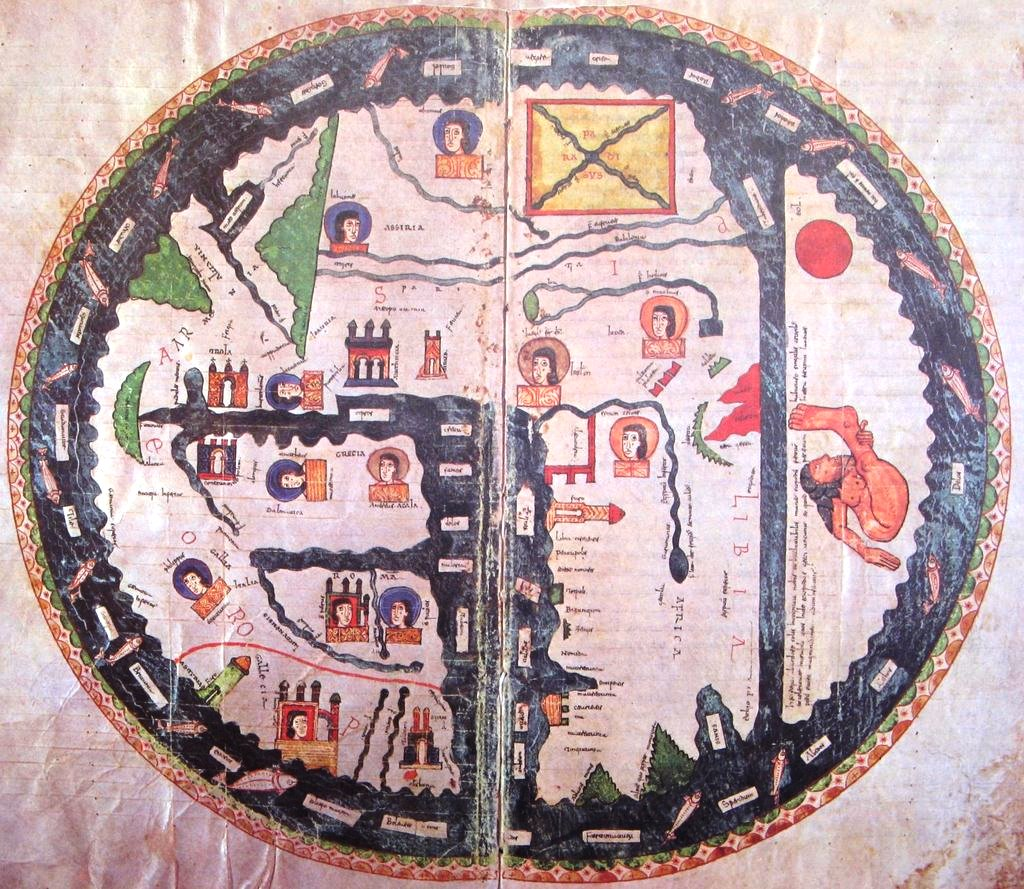 Copia del Museo de la Catedral de El Burgo de Osma del mapa de los Comentarios al Apocalipsis de San Juan del Beato de Liébana.